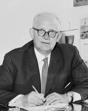 Hans Edvard Wisløff (1902–1969), biskop i Sør-Hålogaland bispedømme fra 1959 til 1969